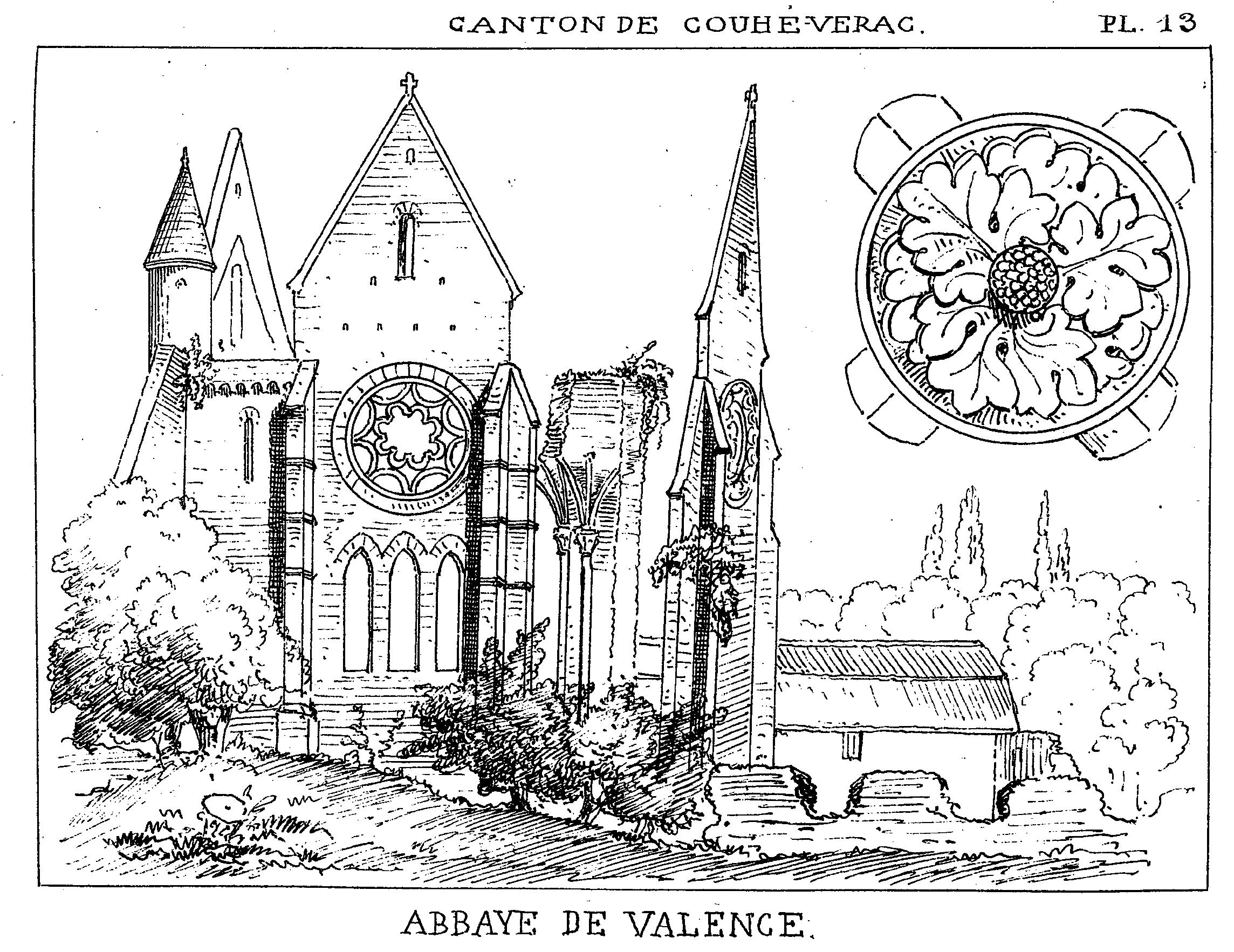 Dessin Abbaye de Valence. 86700 Couhé. Ruines de l'abbatiale au XIXeme siècle